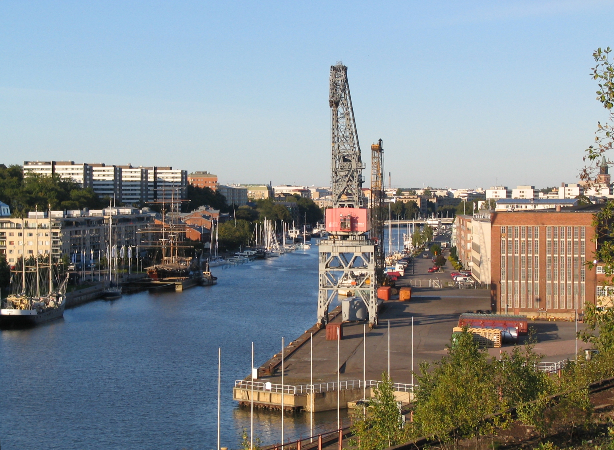 Aura river in Turku from Korppoolaismäki